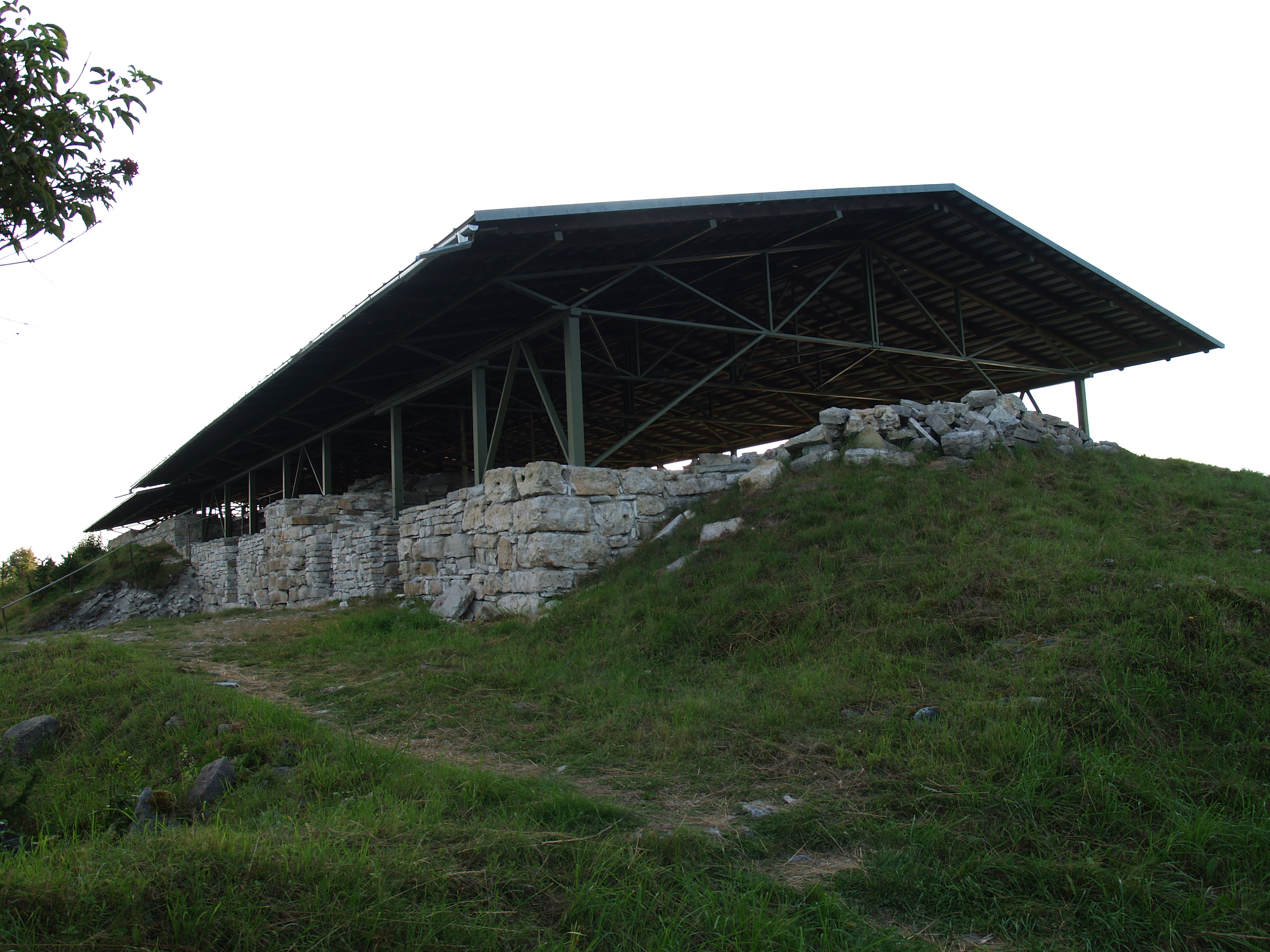 Maasilinn